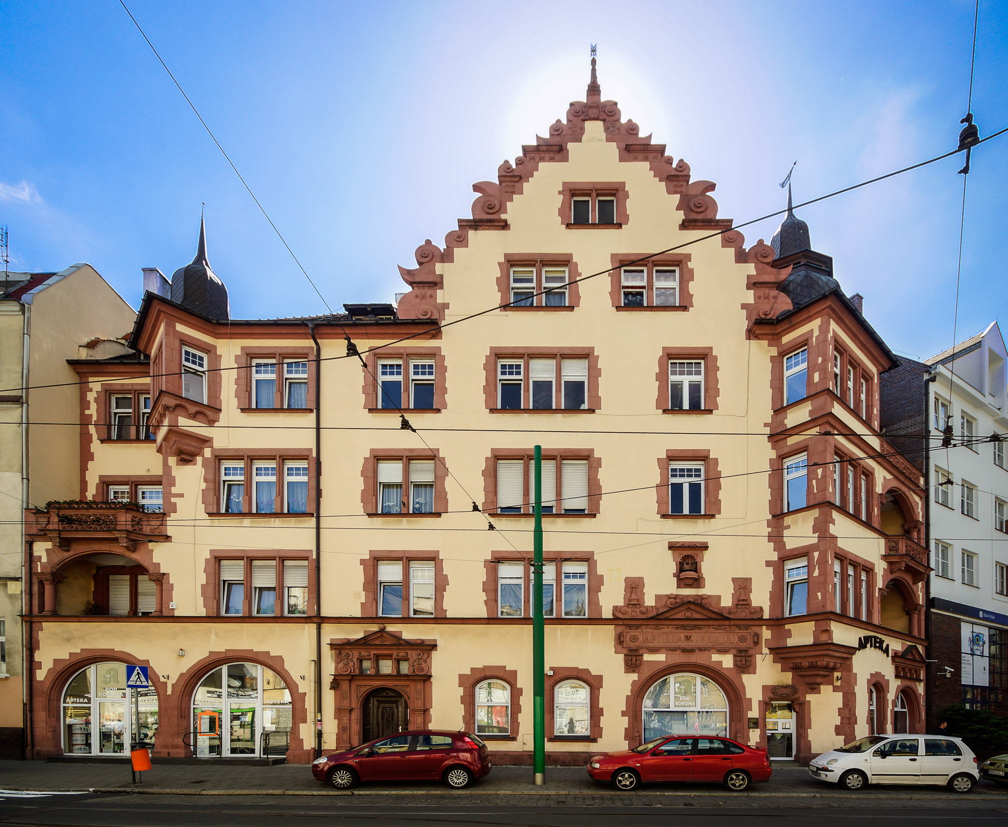 Kamienica przy ul. Górna Wilda